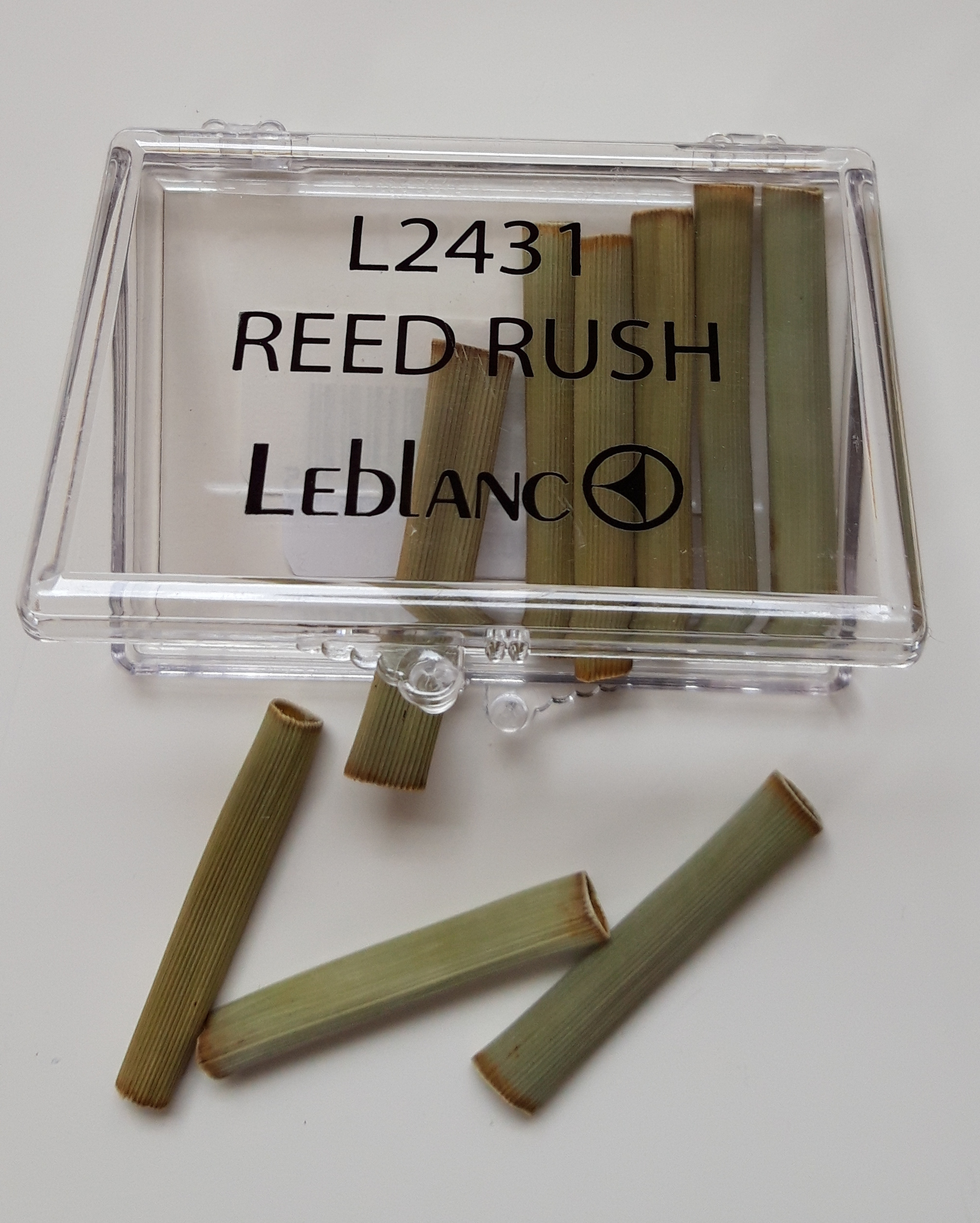 schuurbies voor klarinet rieten.